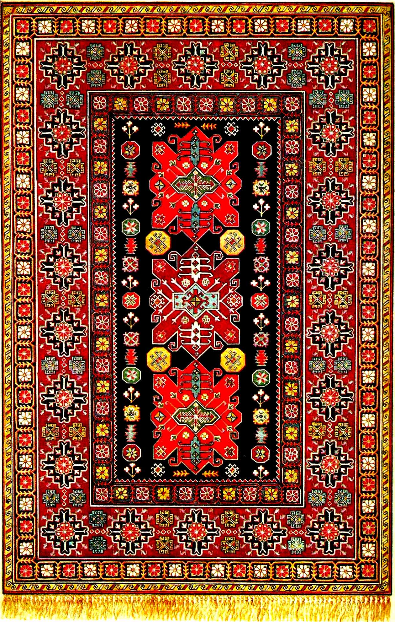 Cek xalçası, XIX əsr